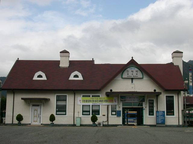 진해선 진해역